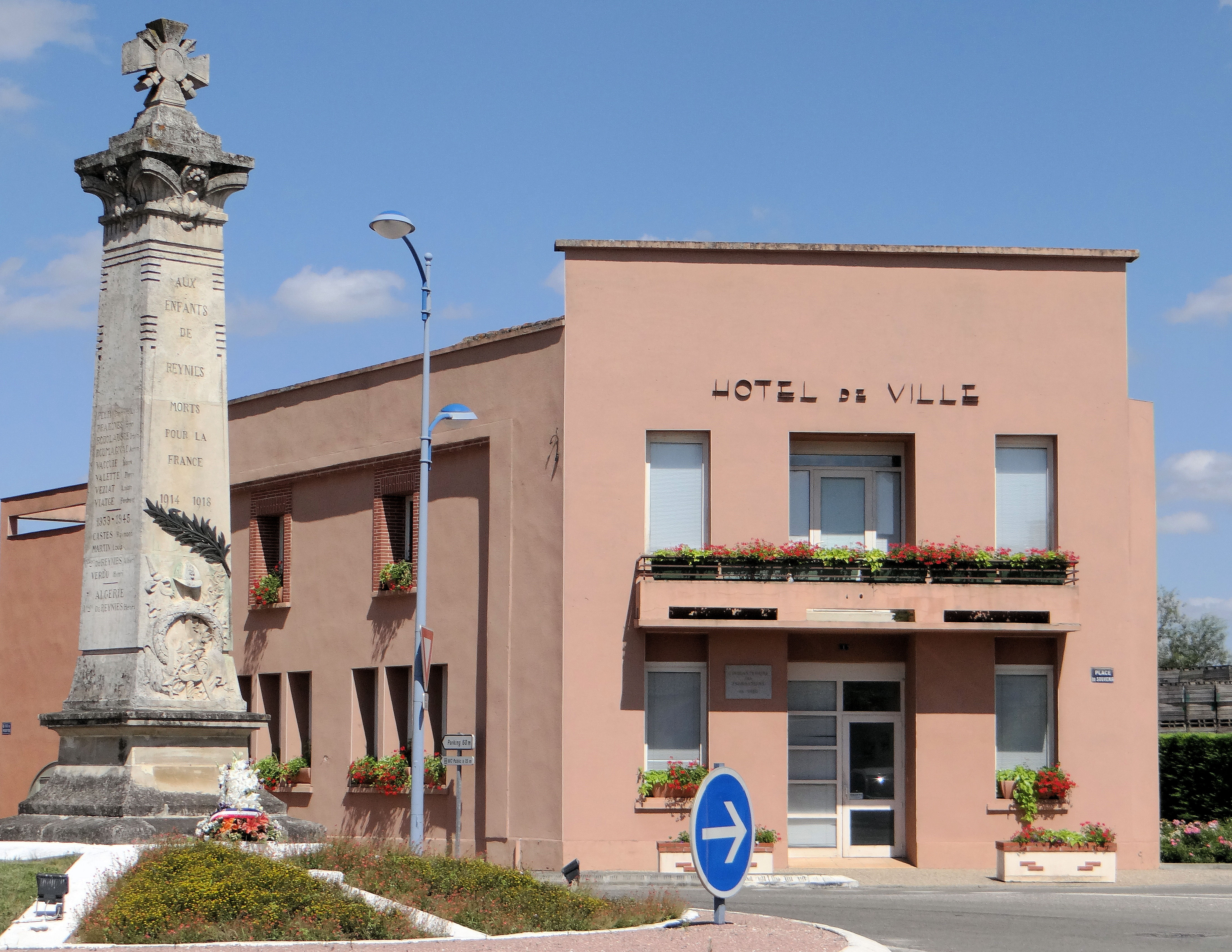 Reyniès (Tarn-et-Garonne, France) - Monument aux morts et hôtel de ville.